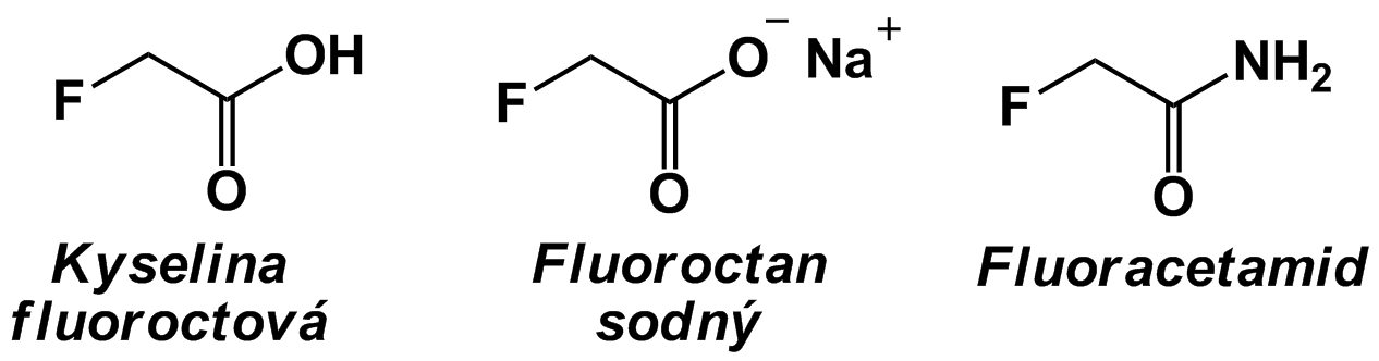 Deriváty kyseliny fluoroctovej.